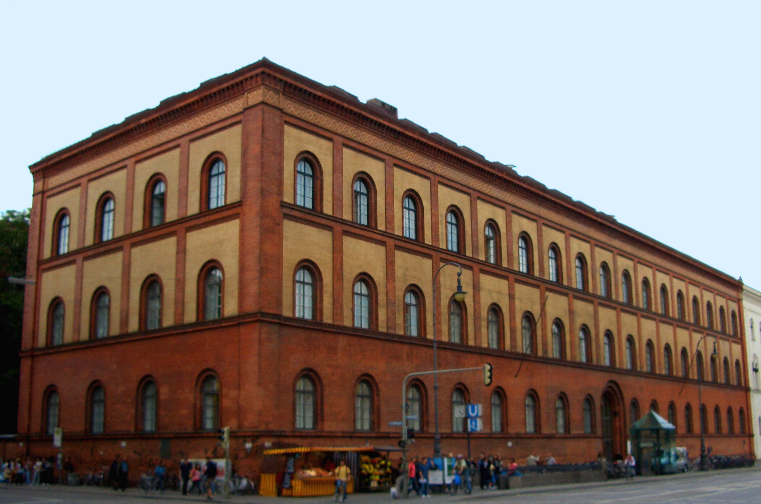 Universitätsbibliothek München, Zentralbibliothek Ludwigstraße